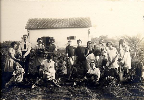 שיעור בחקלאות בית ספר פיק"א עם המורה ירקוני.ילדים עובדים בגן הירק עם כלי עבודה.